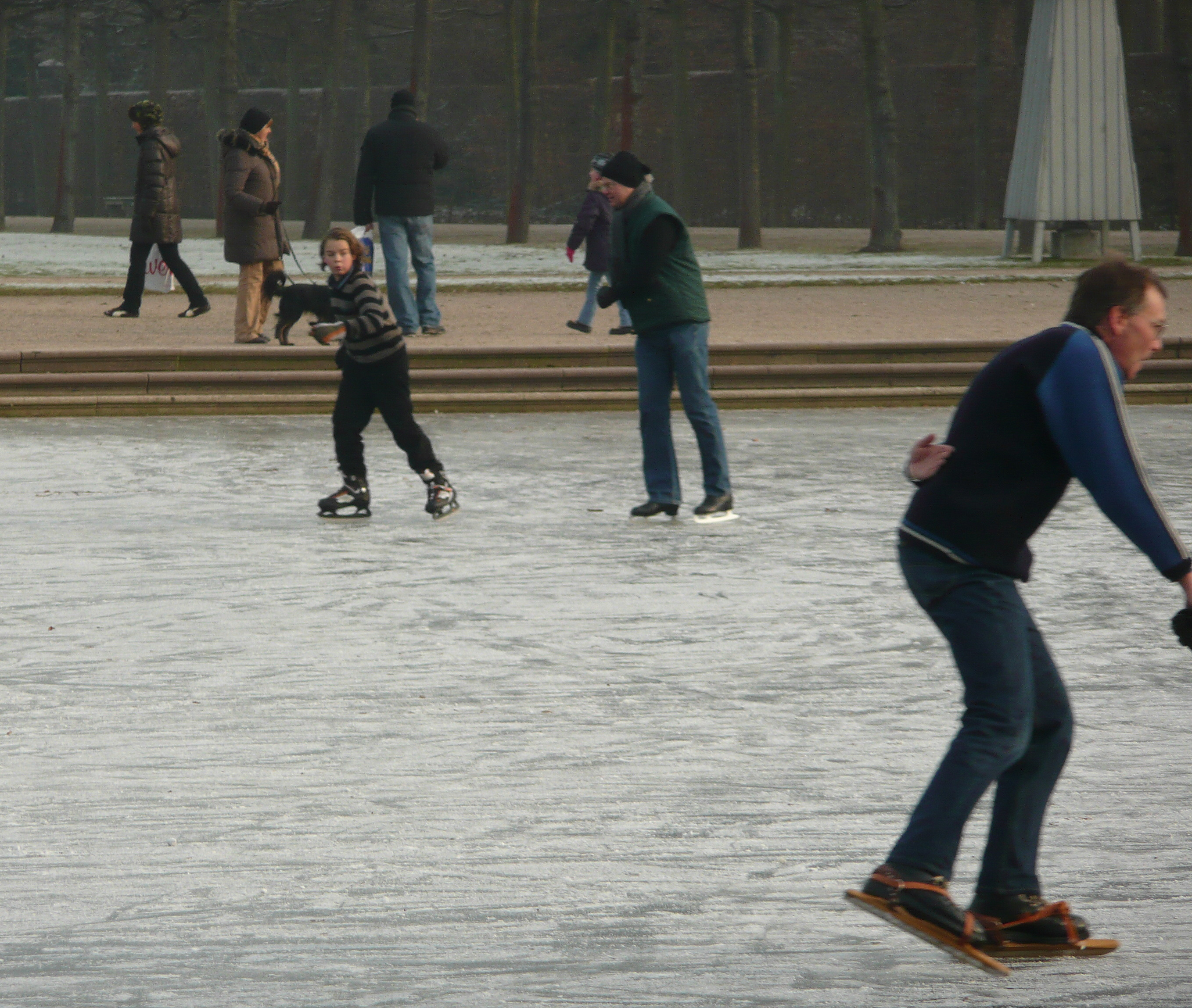 Skating; Schlossgarten Schwetzingen, lake